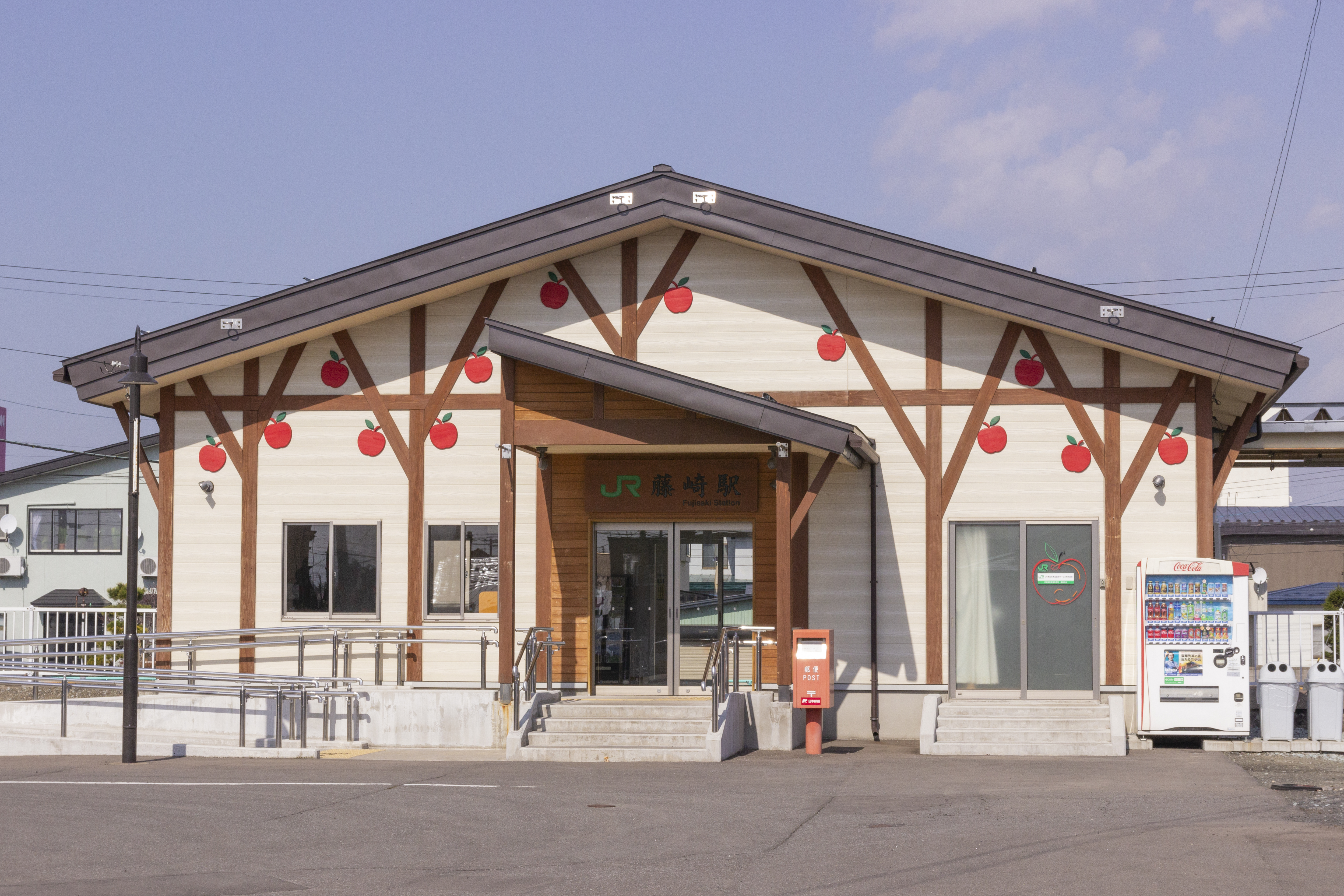 五能線 藤崎駅 新駅舎